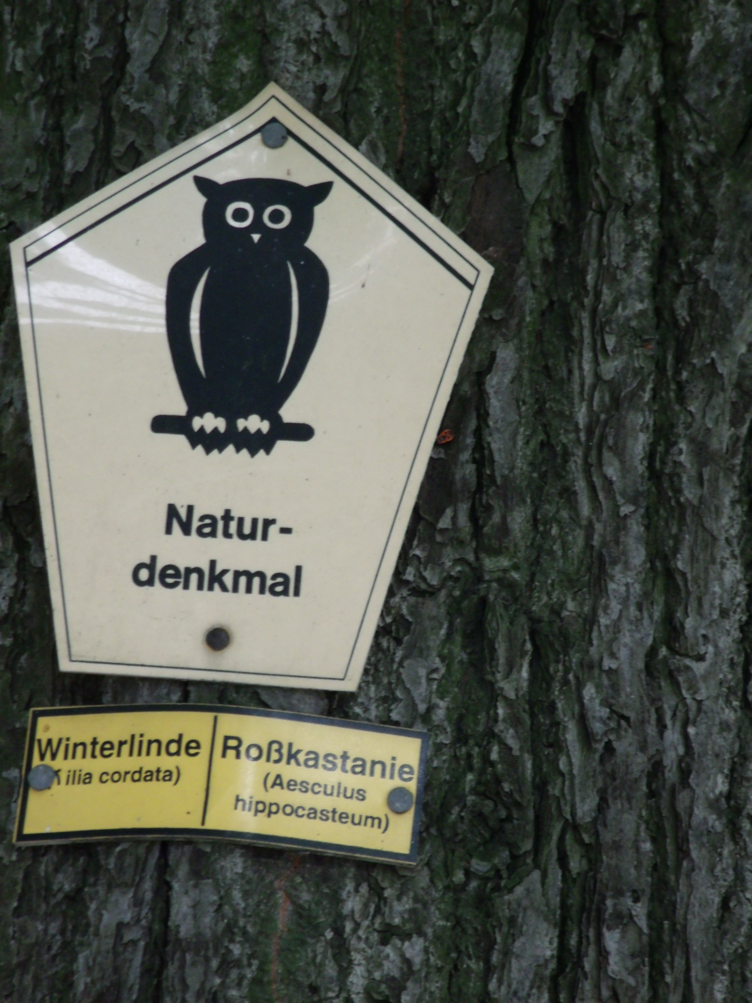 Naturdenkmalschild „Winterlinde/Roßkastanie“ am Ostrower Platz in Cottbus